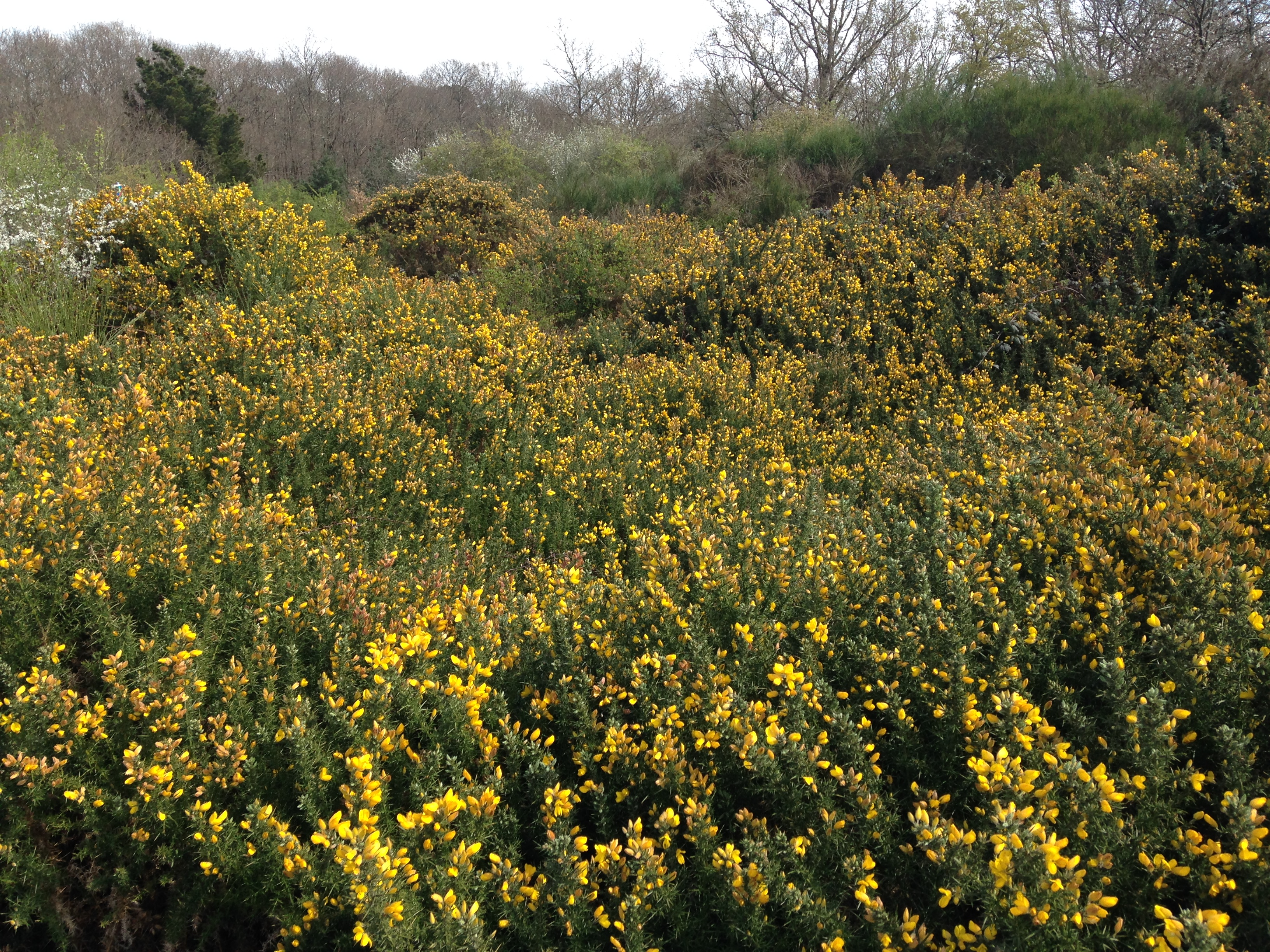 Genêt, Queue de l'étang Saint-Nicolas (Maine-et-Loire, France), l'un de ces cinq espaces naturels.